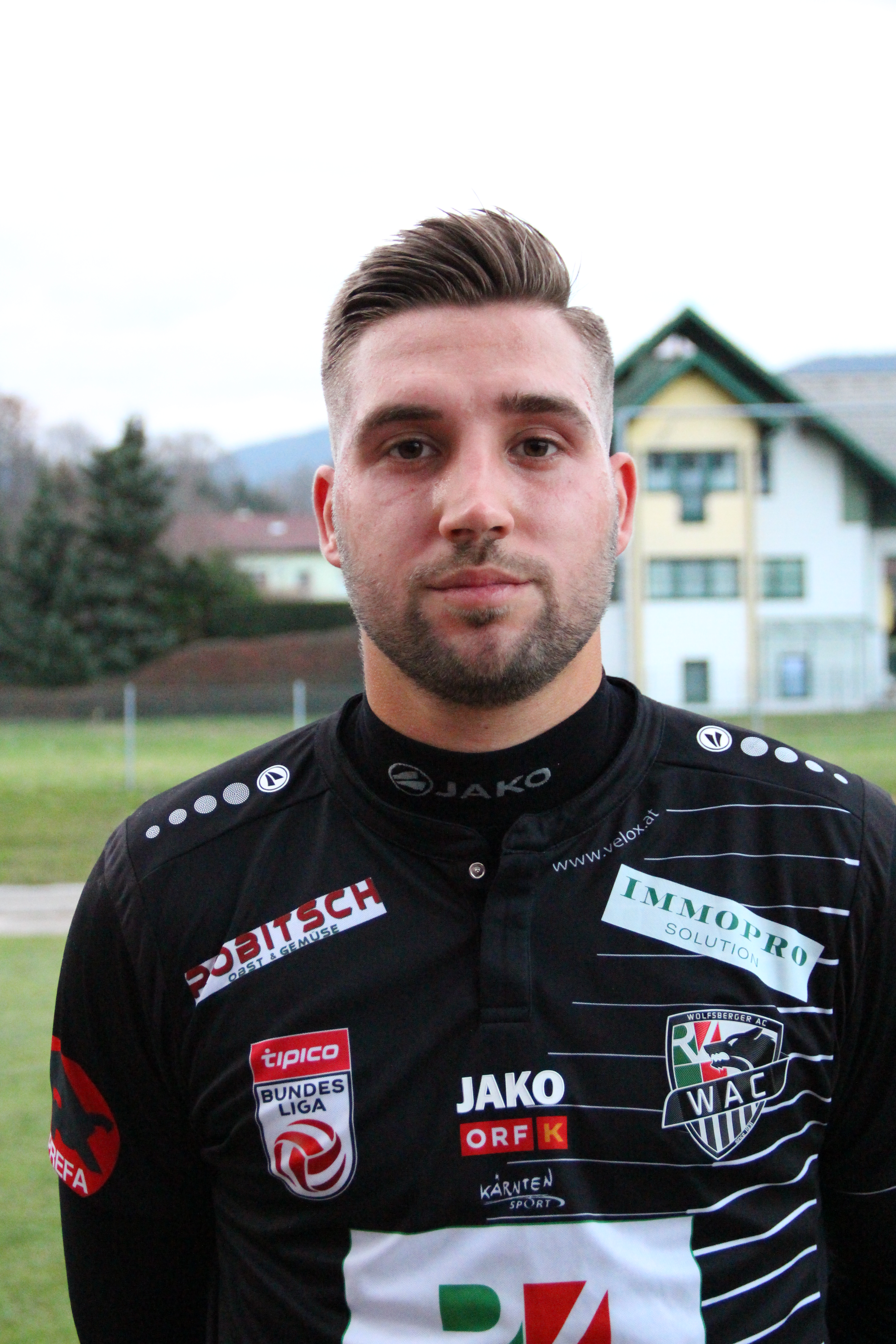 Amar Hodzic (WAC)